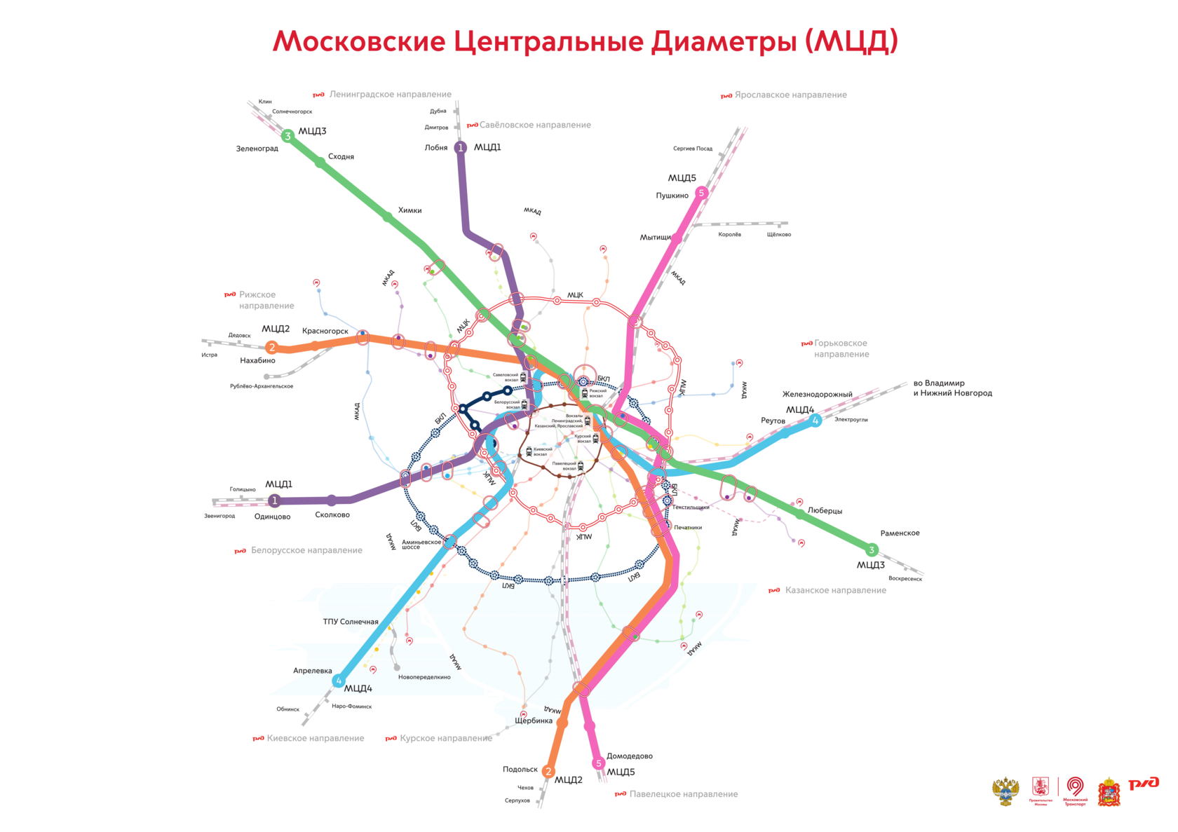 Схема Московских центральных диаметров